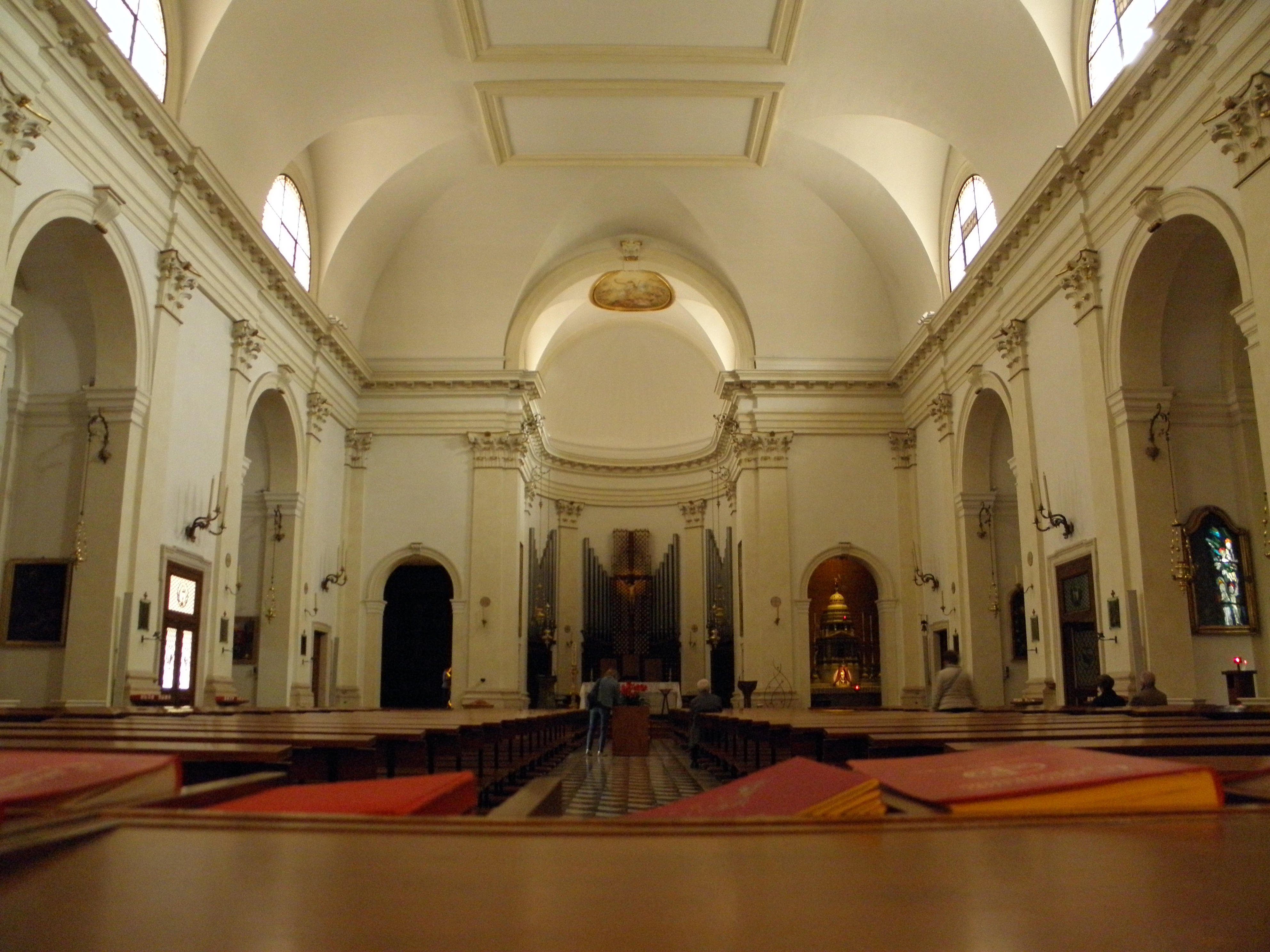 Abano Terme, l'interno del Duomo di San Lorenzo.